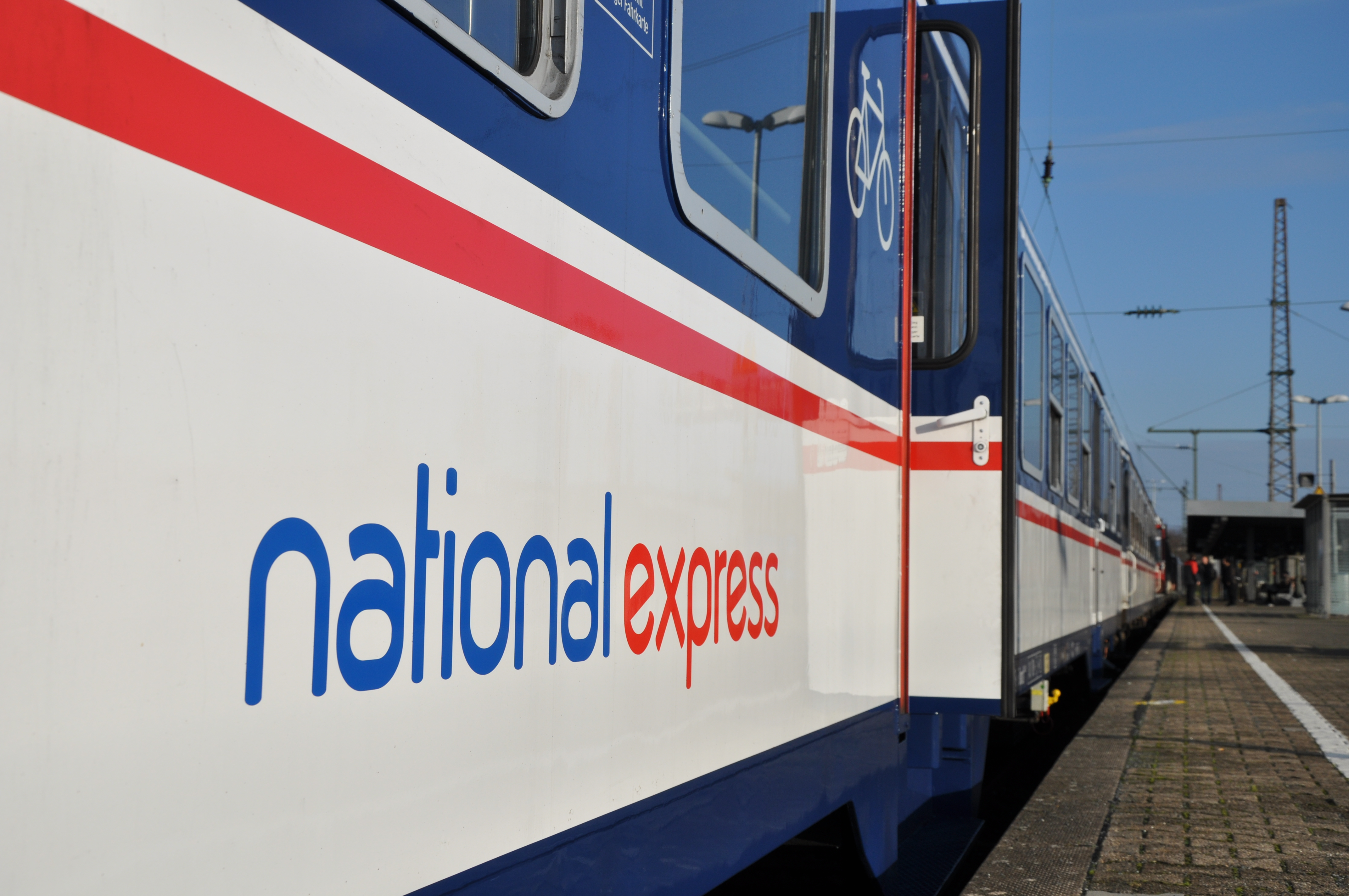 Logo von National Express an einem eigens umlackierten n-Wagen auf der RB 48 in Wuppertal-Oberbarmen